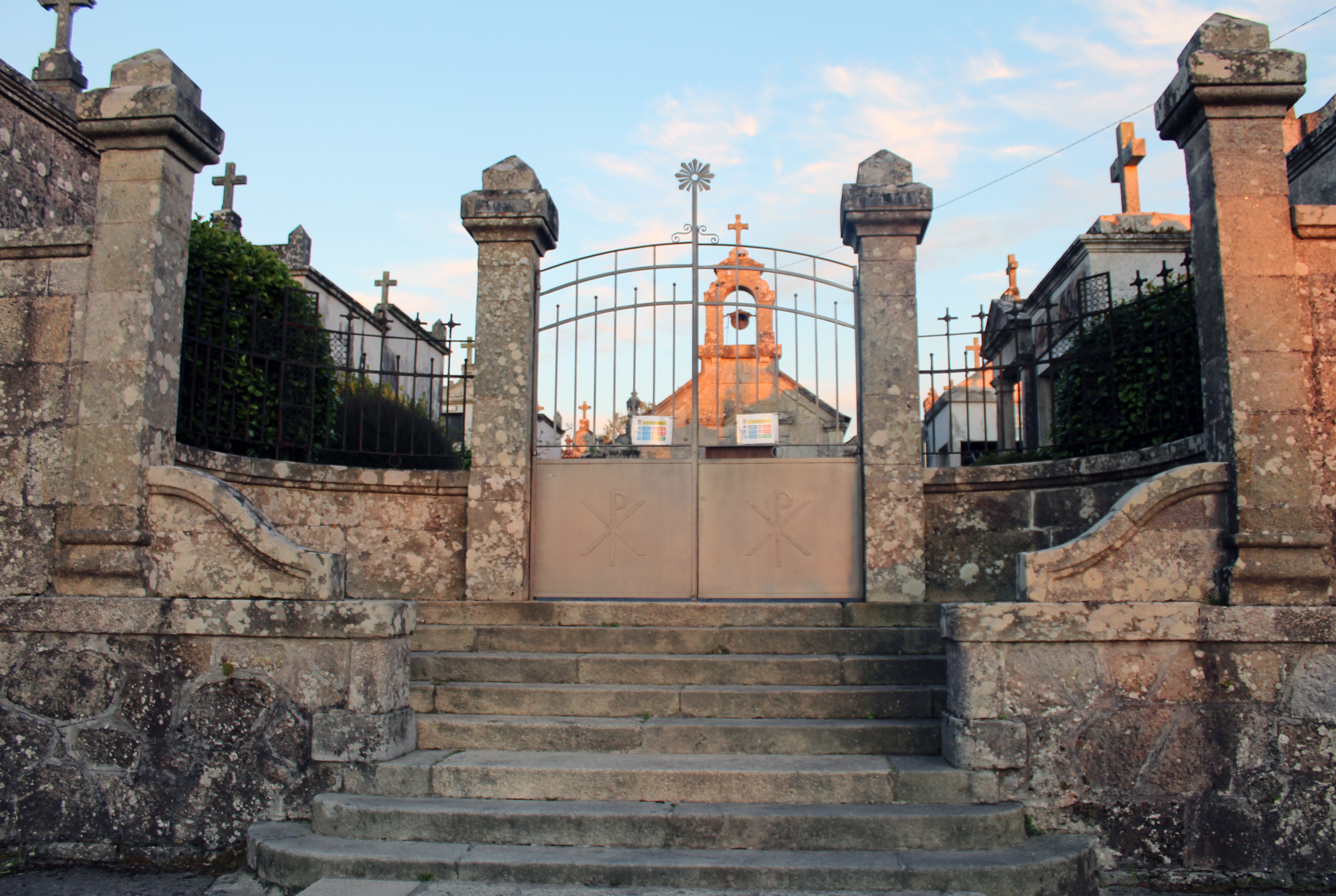 Cemiterio de Mañufe Gondomar